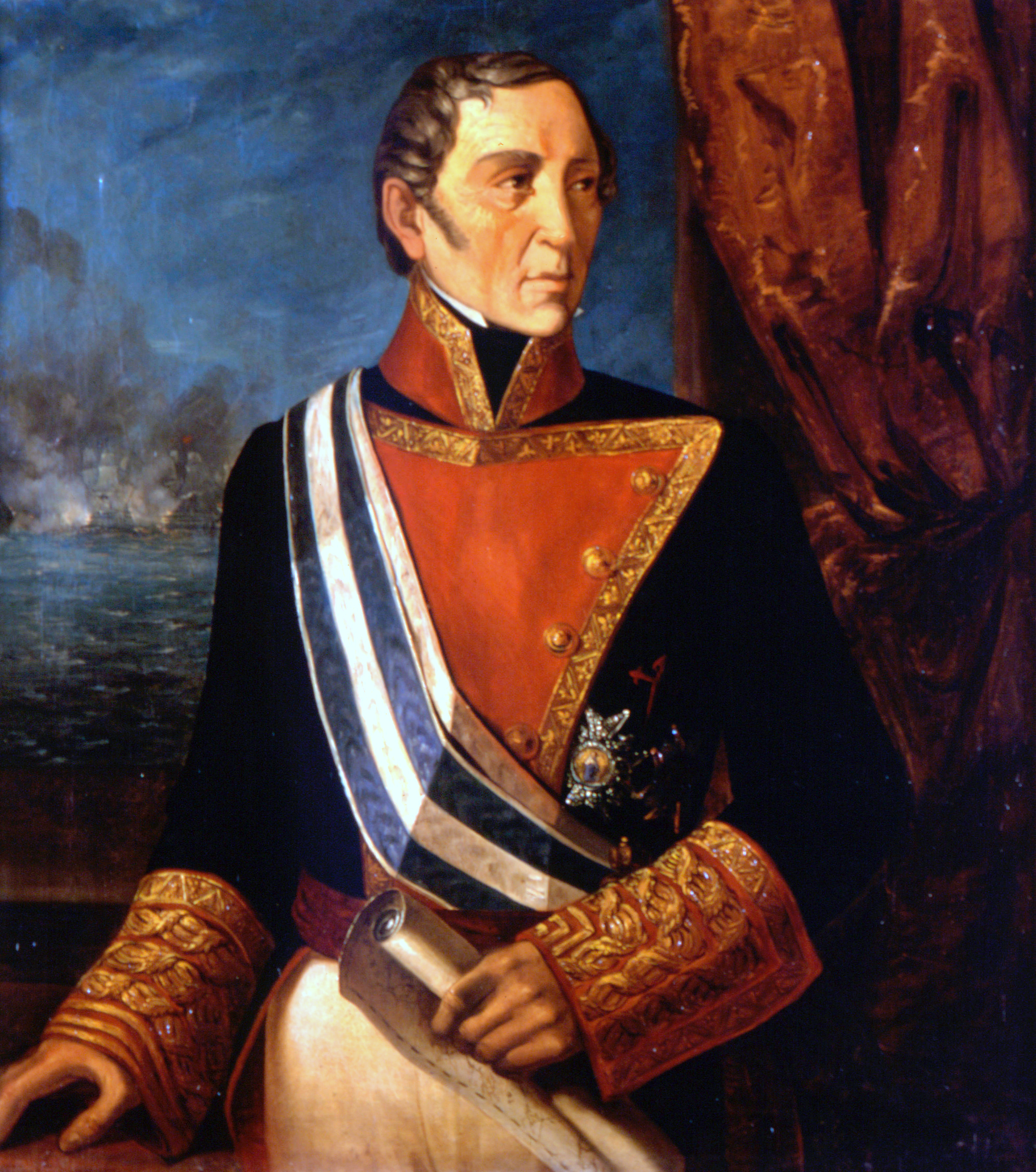 Retrato del marino español Francisco Javier de Uriarte y Borja (1753-1842), que combatió en la batalla de Trafalgar y llegó a ser capitán general de la Real Armada Española. El retratado aparece de pie y de medio cuerpo y vistiendo el uniforme pequeño de capitán general de la Real Armada, con las solapas abiertas a la moda de la época de la reina Isabel II de España. Además, lleva una carta en la mano y luce en el pecho la cruz de caballero de la Orden de Santiago y las bandas y placas de las ordenes de Carlos III y de San Hermenegildo.